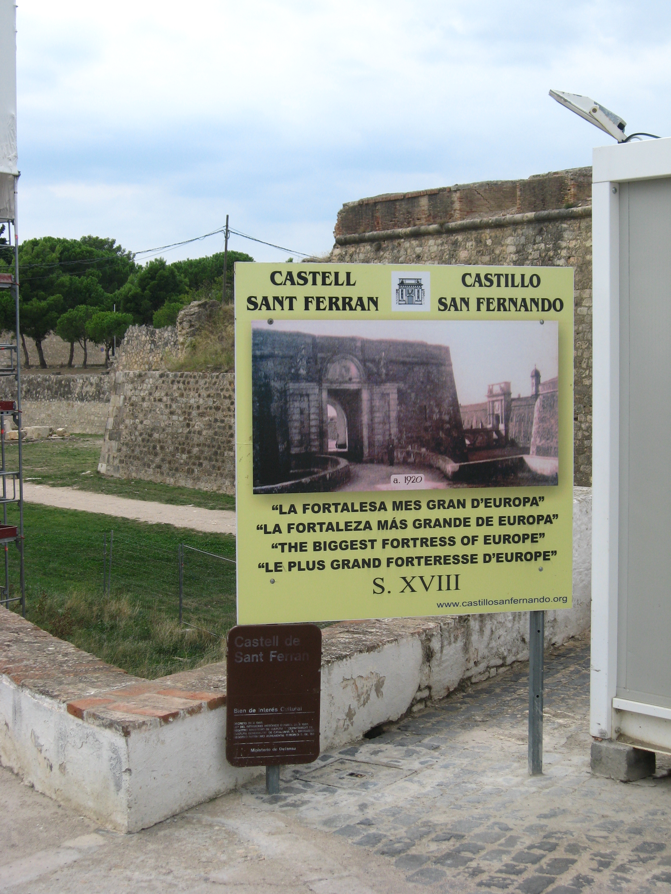 Das Kastell von Sant Ferran (Figueres/Katalonien) Datum: 16.09.2010 Urheber: Michael Pfeiffer alias Benutzer:Gordito1869 Quelle: privates Fotoarchiv des Urhebers